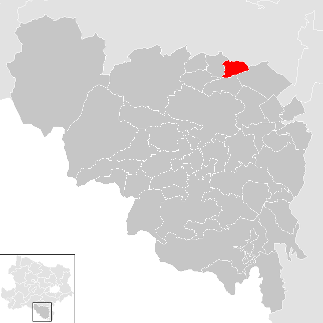 Bezirk Neunkirchen